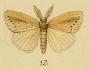 Laelia fracta Schaus & Clements, 1893